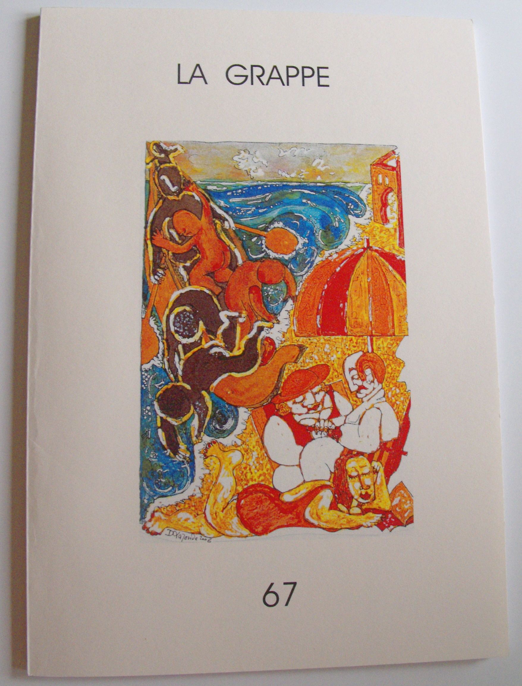 Couverture de la revue littéraire "La Grappe" N°67